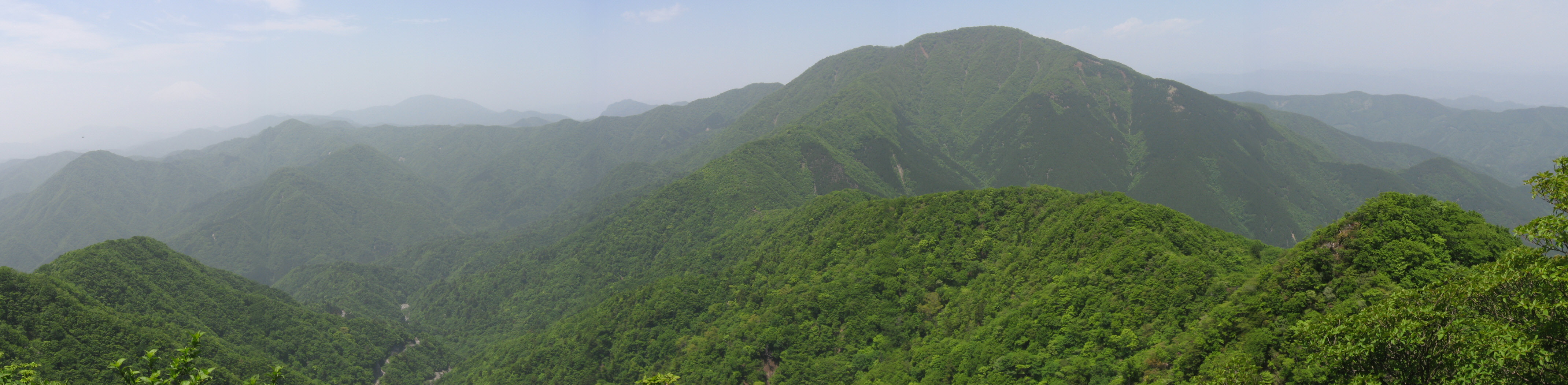 大笄付近からの眺望